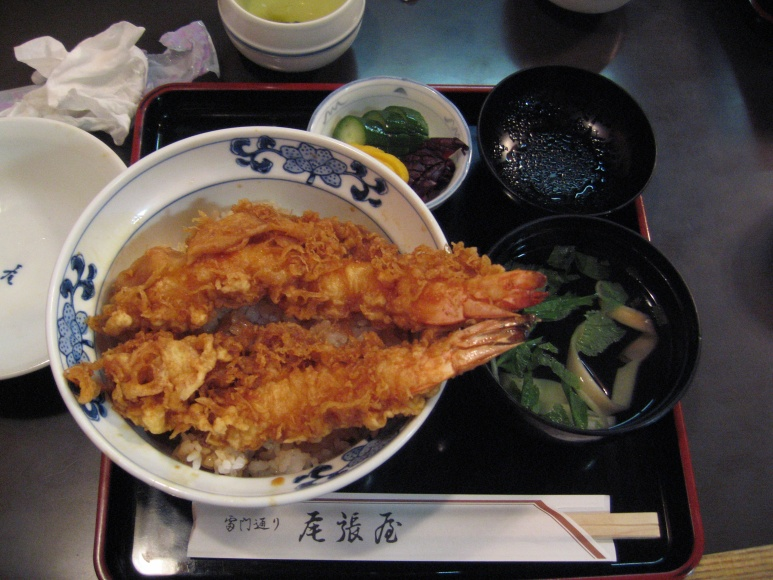 PIMG_3229